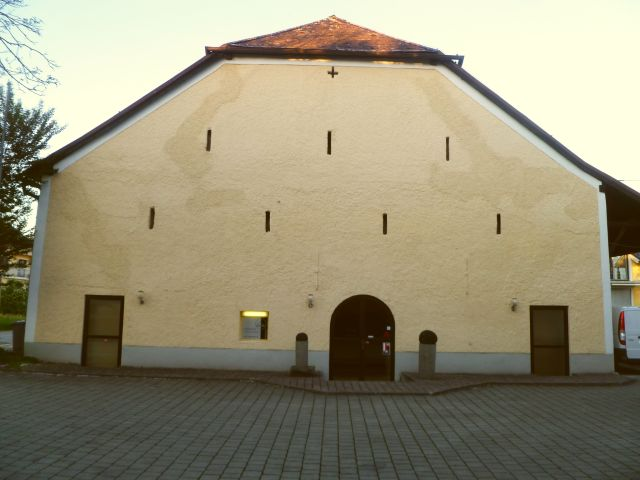 Weiherhof (Salzburg): Galerieeingang